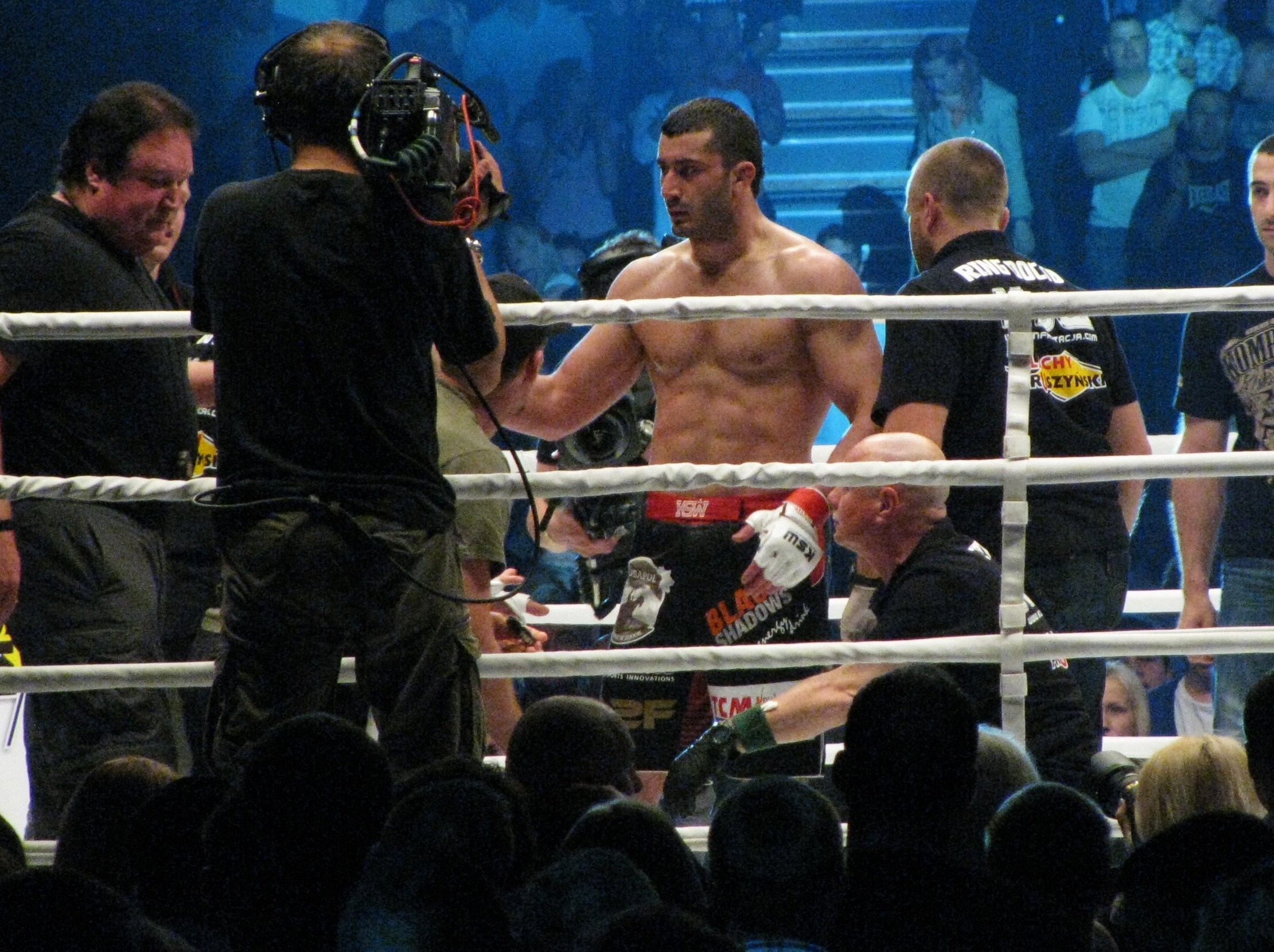 Mamed Khalidov podczas KSW XVI.